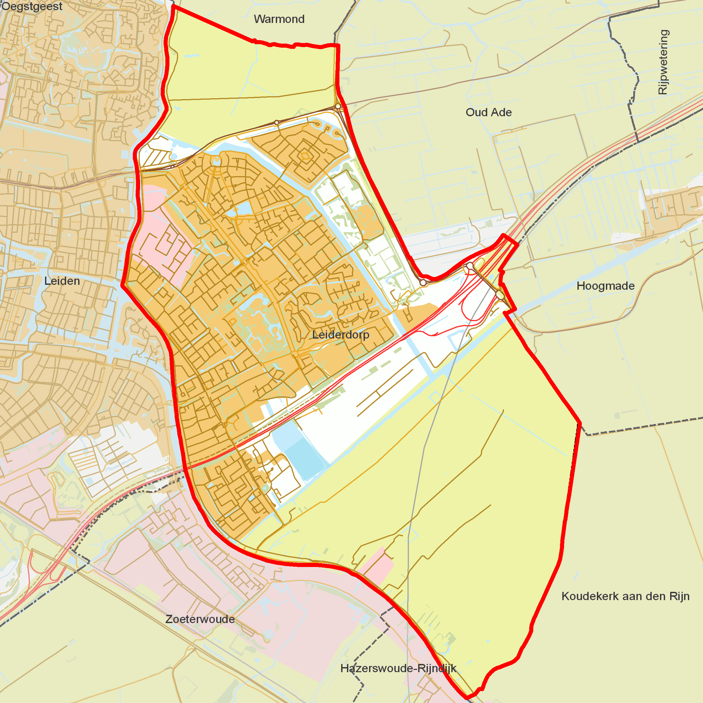 BAG woonplaatsen - Gemeente Leiderdorp.png